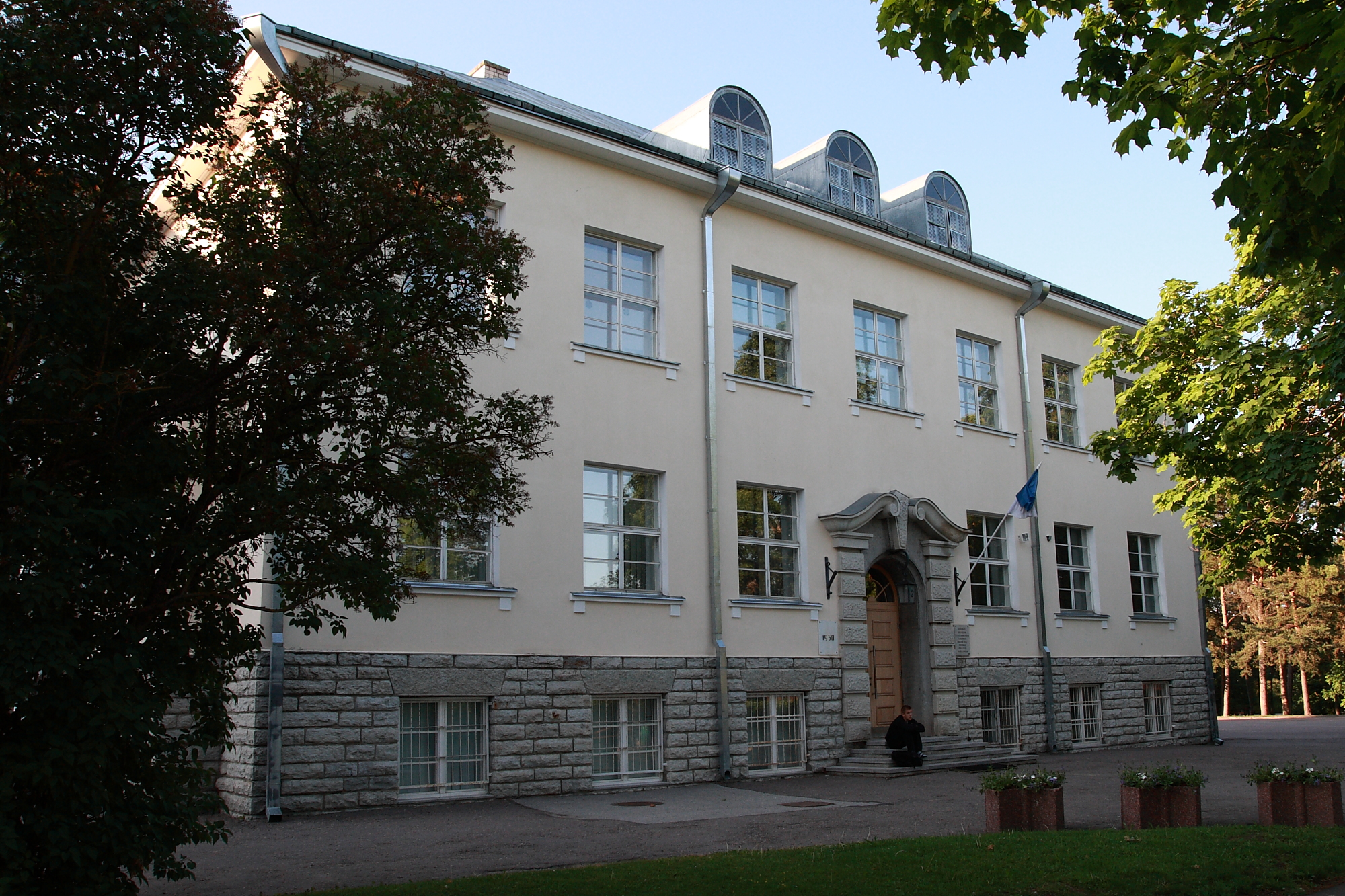 Keila algkooli hoone